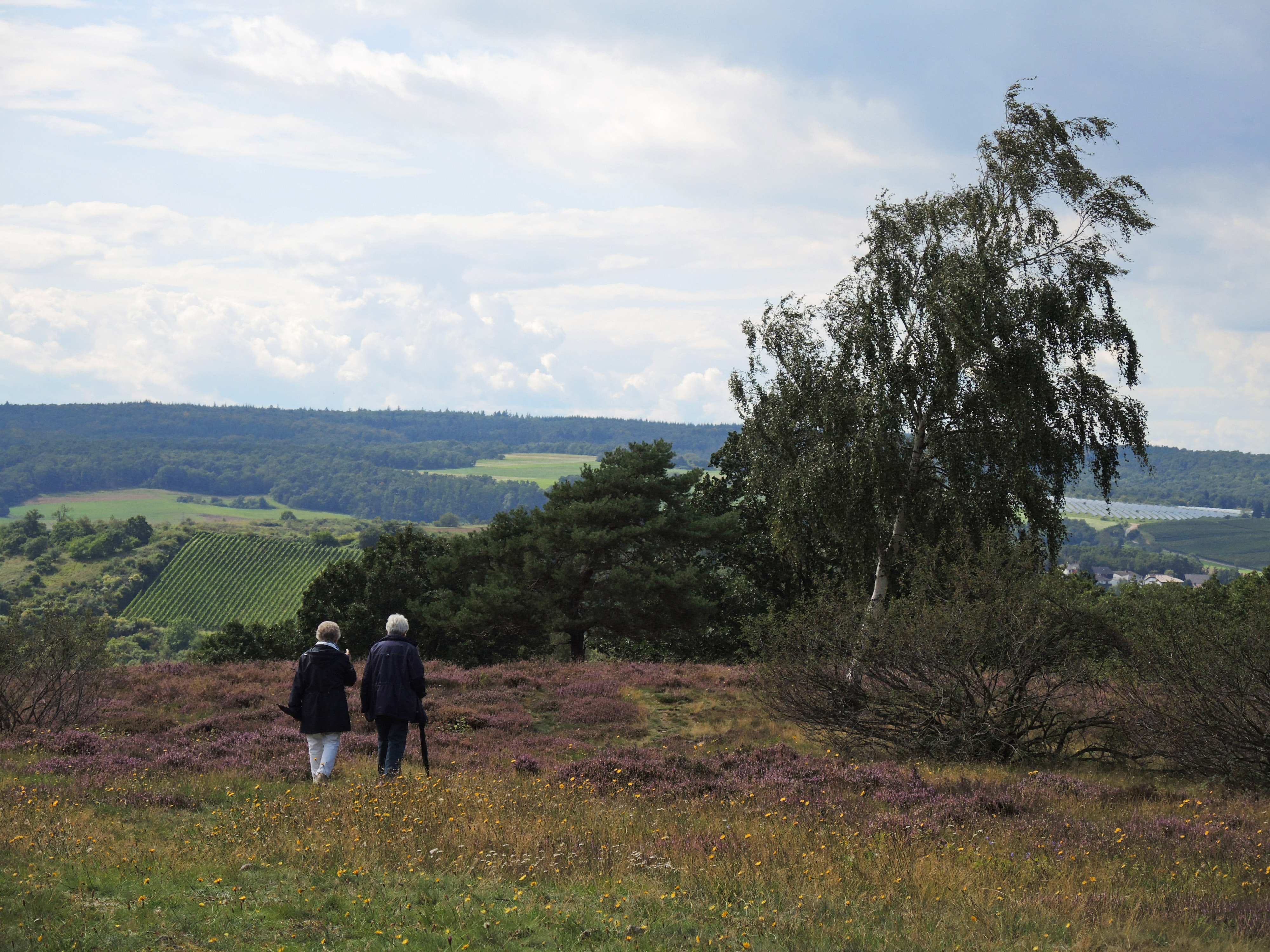 (NSG:RP-7133-001)_Neu-Bamberger-Heide